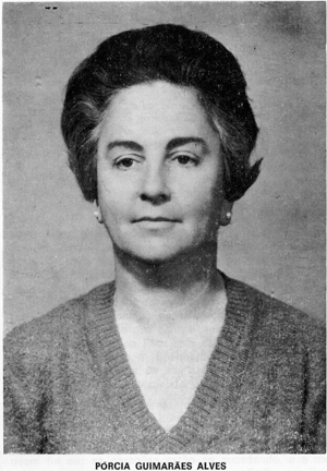 Professora Pórcia Guimarães Alves, em entrevista a José Vicente Augusto das Neves Miranda